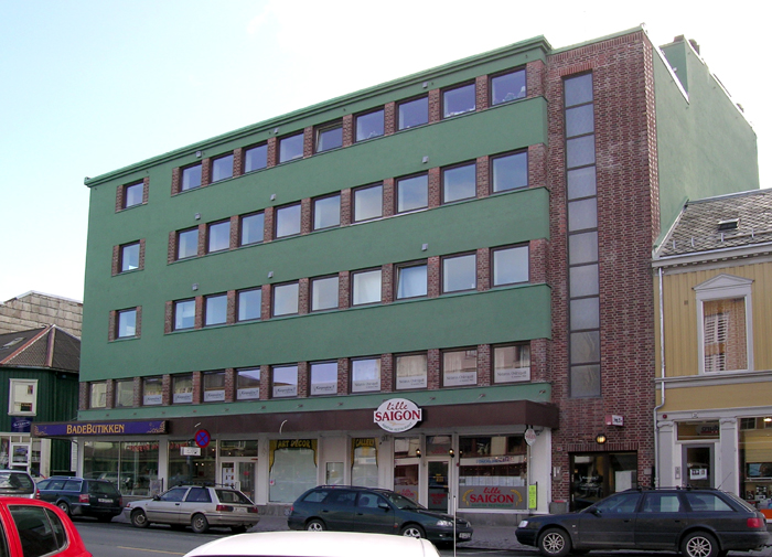 Melandsøgården, Fjordgata 25, Trondheim. Bygd 1932; arkitekt Maja Melandsø.